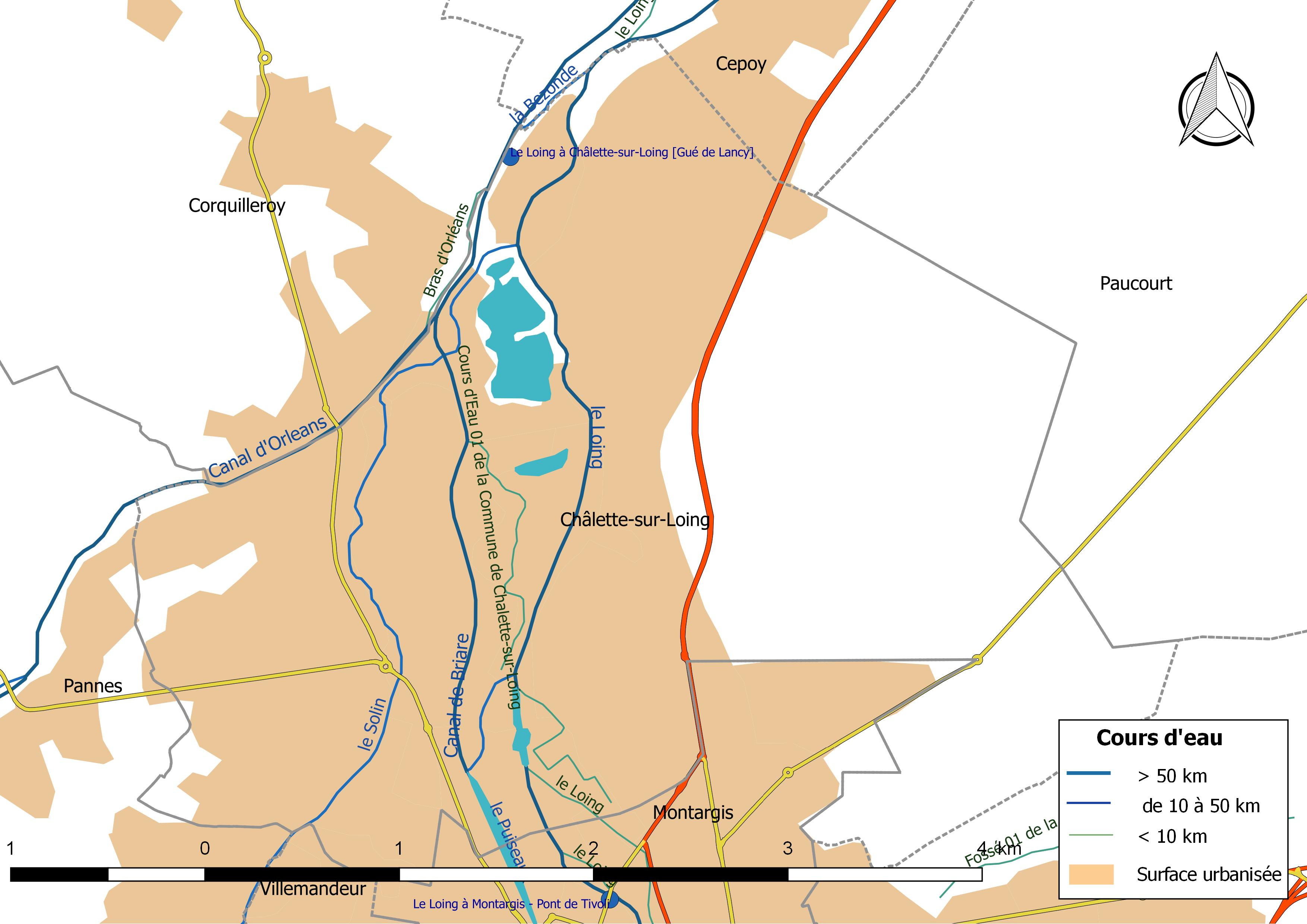 Carte du réseau hydrographique de la commune de Châlette-sur-Loing (France).